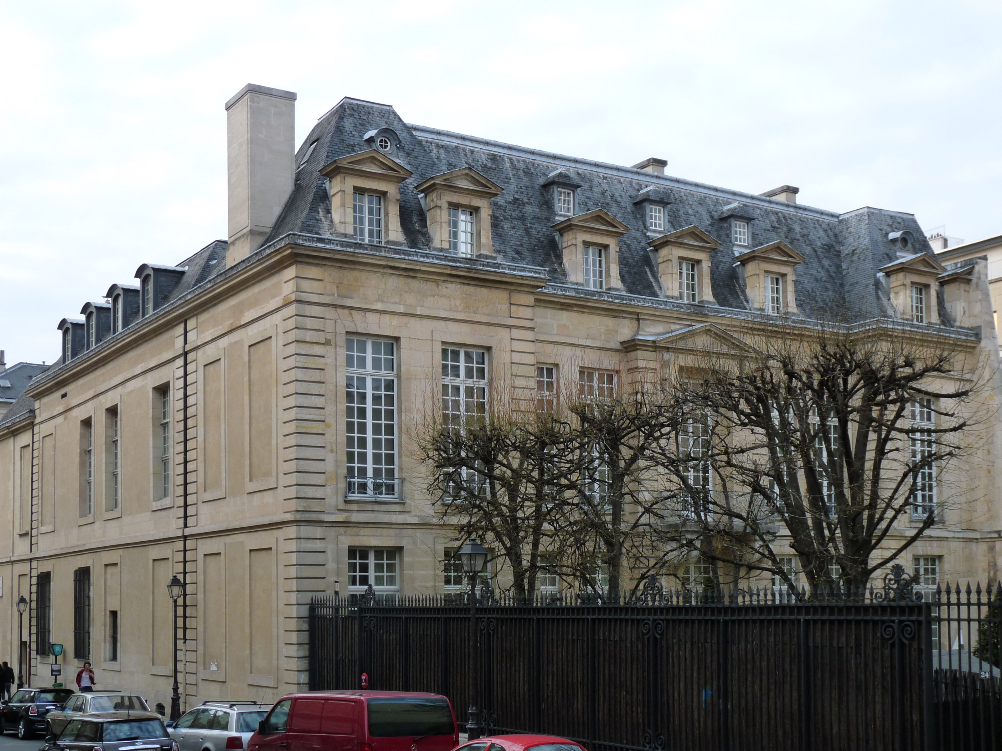 L'hôtel de Guénégaud à Paris, côté jardin, vue depuis la rue des Archives.